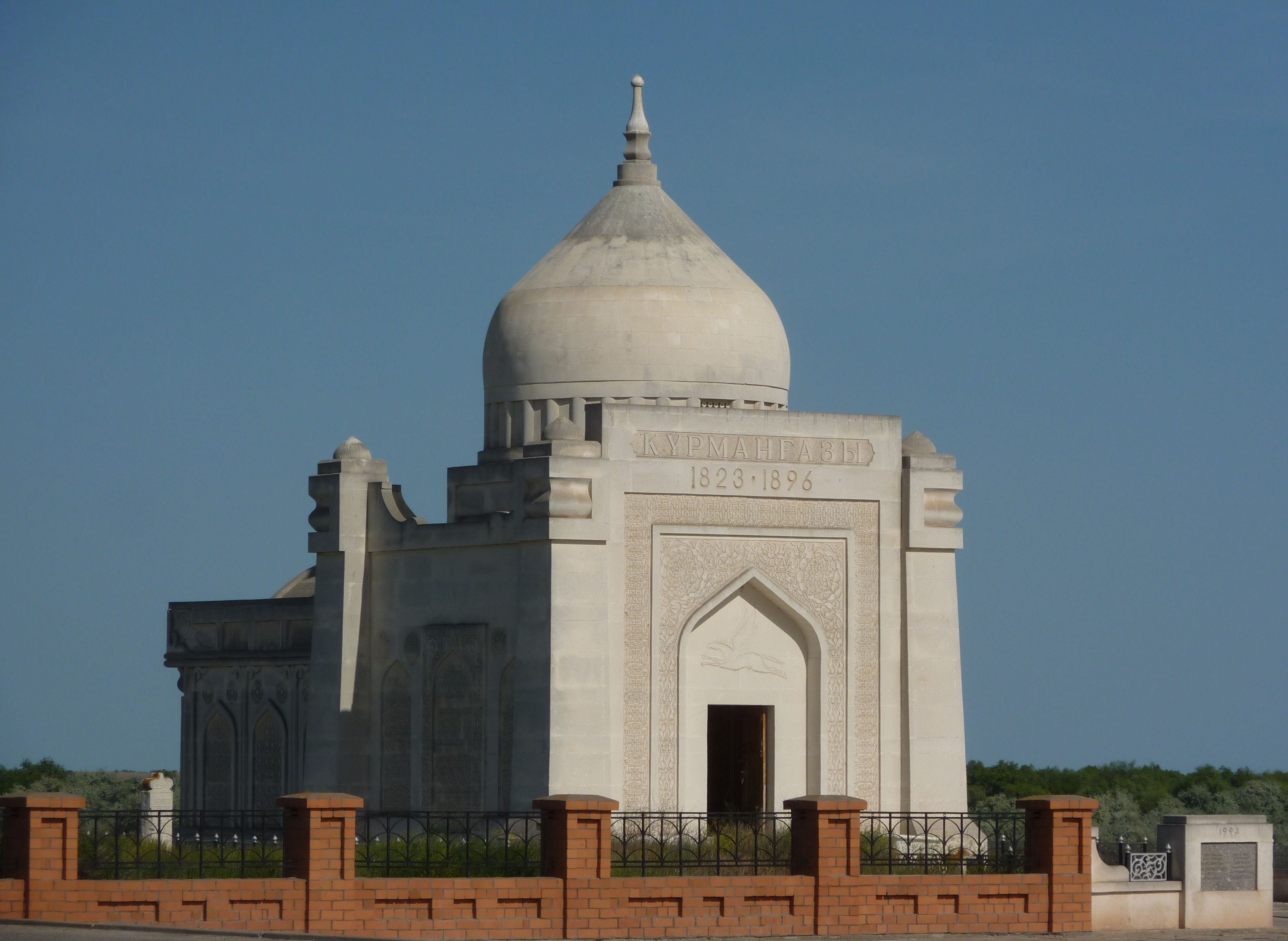 Das Mausoleum von Kurmangasi beim Dorf Altynschar, Oblast Astrachan